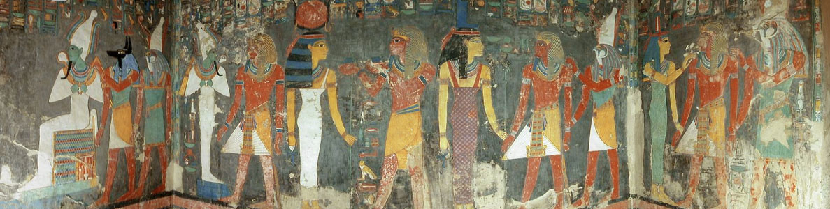 La tombe de Horemheb (1327-1295 av J.C.) Horemheb a été le dernier pharaon de la XVIIIème dynastie. Il a rétabli le culte d'Amon en s'efforçant d'effacer toutes traces du prédécesseur de Toutankhamon, son père Aménophis IV : Akhénaton. Panorama de l'une des parois, au-dessus du puits. Les scènes représentent le Roi accueilli par le monde divin et accomplissant des offrandes.